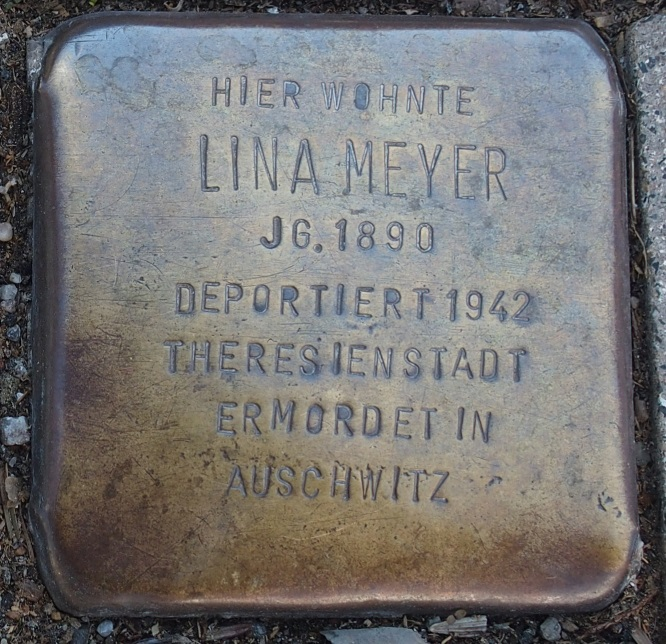 Stolperstein in Soest Thomästraße 20, Lina Meyer